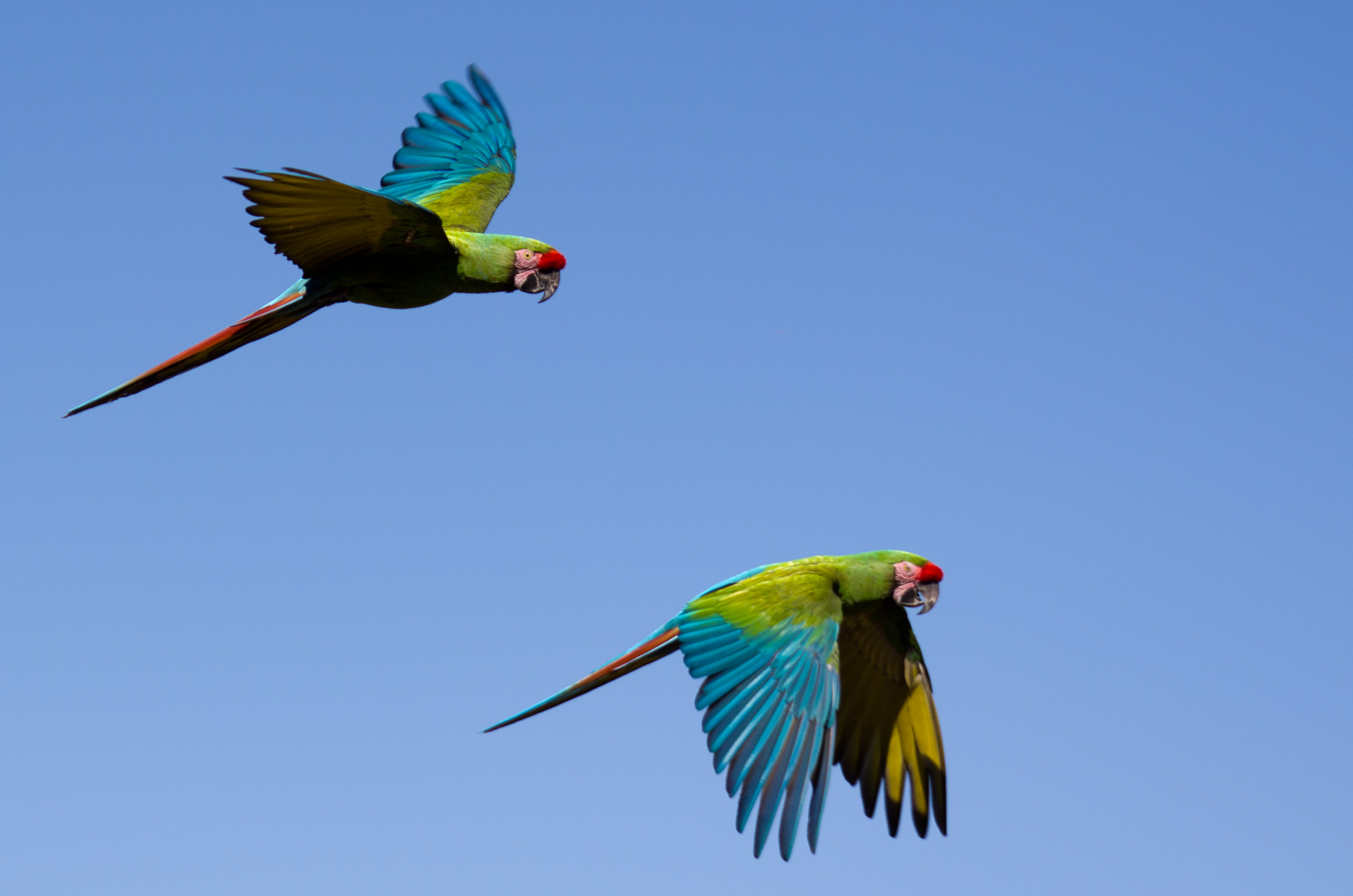 Perroquets en vol Flying parrots